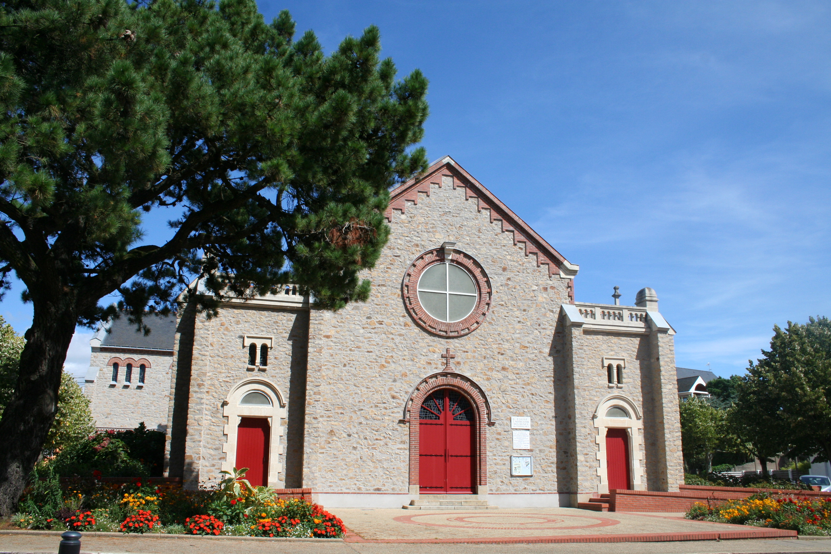 Eglise Notre-Dame des Dunes de Pornichet